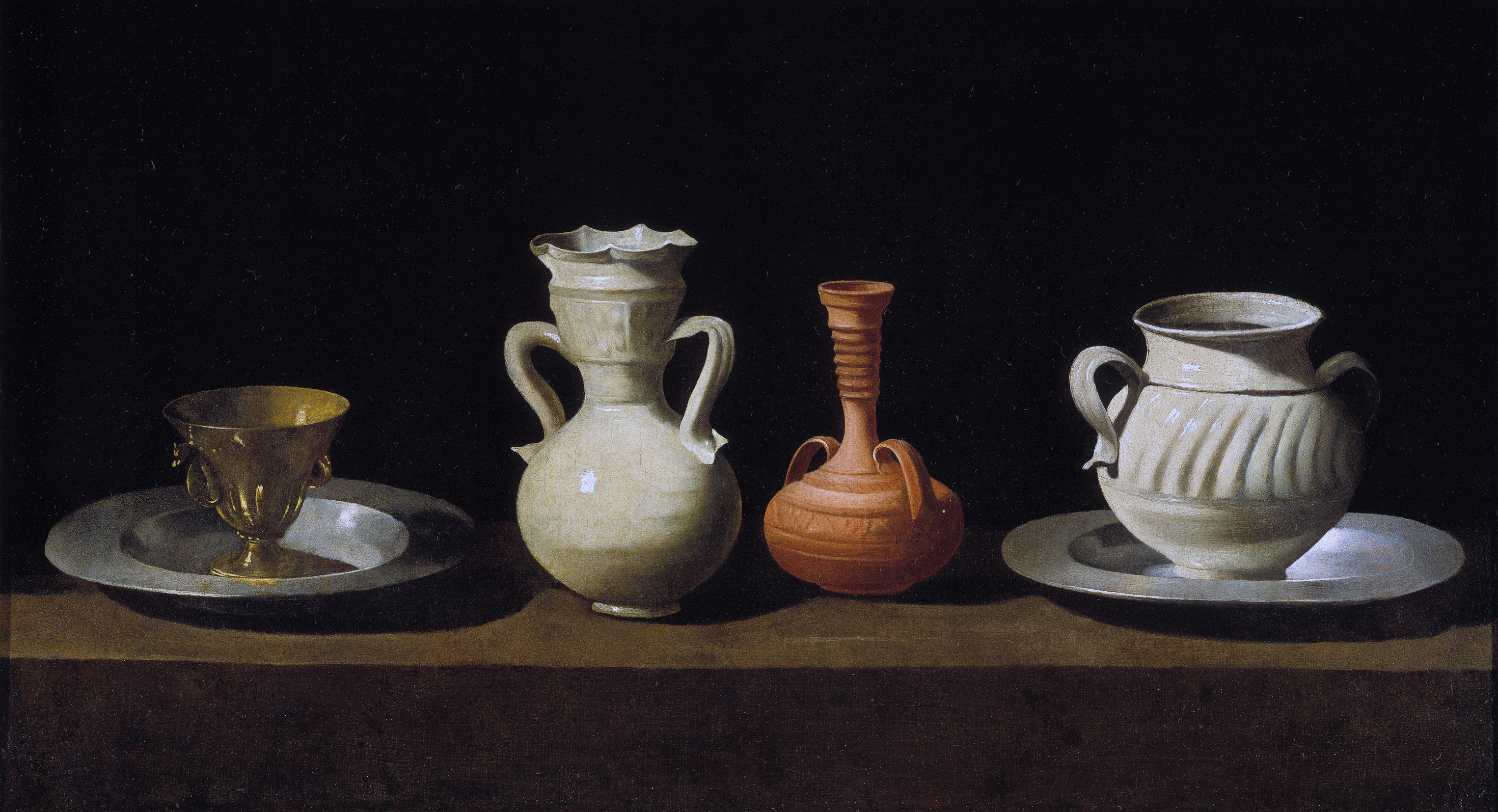 Francisco de Zurbarán, Bodegón, Museo del Prado, óleo sobre lienzo, 46 cm x 84 cm. La pintura representa seis utensilios de menaje: un recipiente de metal y tres cerámicos, de los que el primero (metálico) y el cuarto reposan sobre sendos platos, y todos se asientan encima de una repisa. El artista se recrea en representar distintas texturas, brillantes o mates en un fondo negro. Utiliza una disposición de los elementos muy simple. Es la luz tenebrista la que hace destacar las figuras, pero no hay sombras proyectadas entre ellos, por lo que debió de pintar cada uno de los objetos separadamente. Es uno de los escasos bodegones del maestro extremeño y, como es habitual en él, se detiene en el placer de representar los distintos materiales y texturas, que capta con un alarde de técnica. La sobriedad del cuadro elude presentar significado simbólico alguno. Todo es materialidad y quietud.